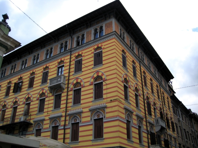 "Turska kuća" ("Casa turca") u Rijeci